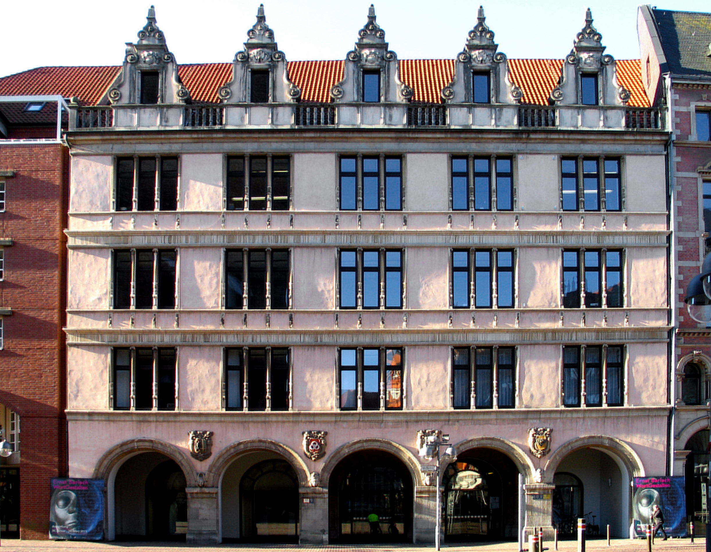 Das denkmalgeschützte, bis 1913 durch den Architekten Rudolf Friedrichs und den Bildhauer Ludwig Vierthaler für die Georg von Cölln, Eisenwarenhandlung errichtete Büro- und Geschäftshaus unter der (heutigen) Adresse Am Markte 8; unter den verschiedenen Namen des Vorderhauses und seiner Galerie, heute das Forum des Niedersächsischen Landtages, wurde zum Anfang 2013 die umfassende Werks-Ausstellung Ernst Barlach, WortGestalten organisiert ...